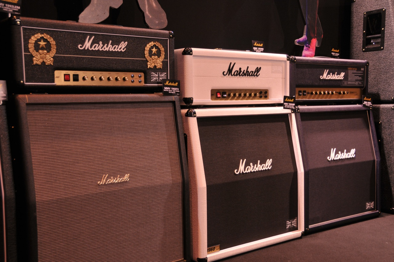 Marshall Anniversary edition guitar amplifiers Salon de la Musique et du Son 2008